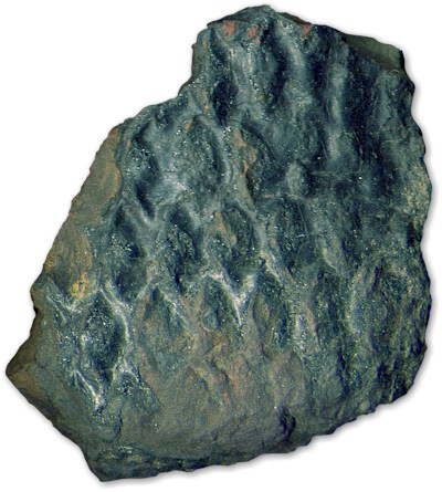 Description: Écorce fossile de Lépidodendron (Graissessac, Hérault)Source: Hugo SoriaLicence: GFDL Hugo Soria